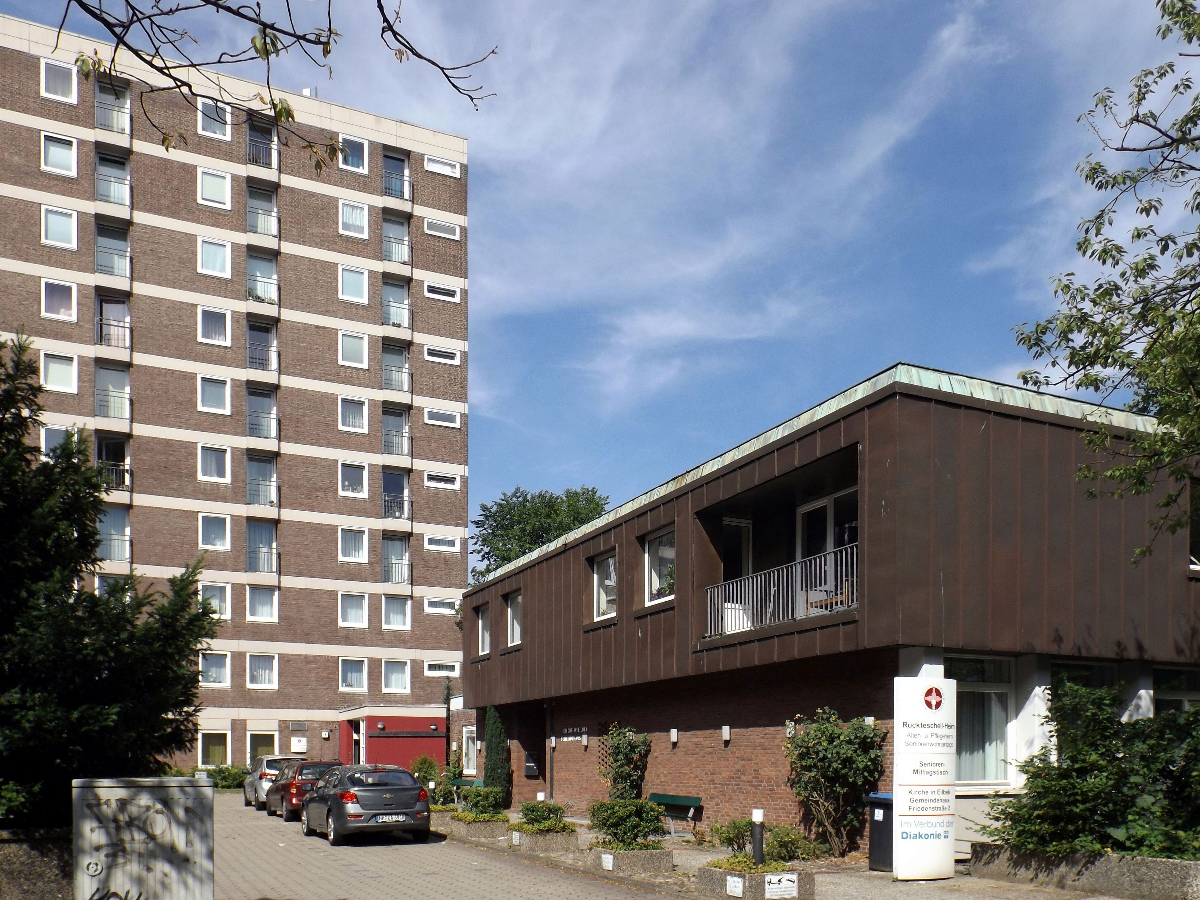 Alten- und Pflegeheim der Stiftung Eilbeker Gemeindehaus in Hamburg-Eilbek, Wandsbeker Chaussee / Ecke Friedenstraße, rechts das Gemeindehaus der Friedenskirche/Osterkirche